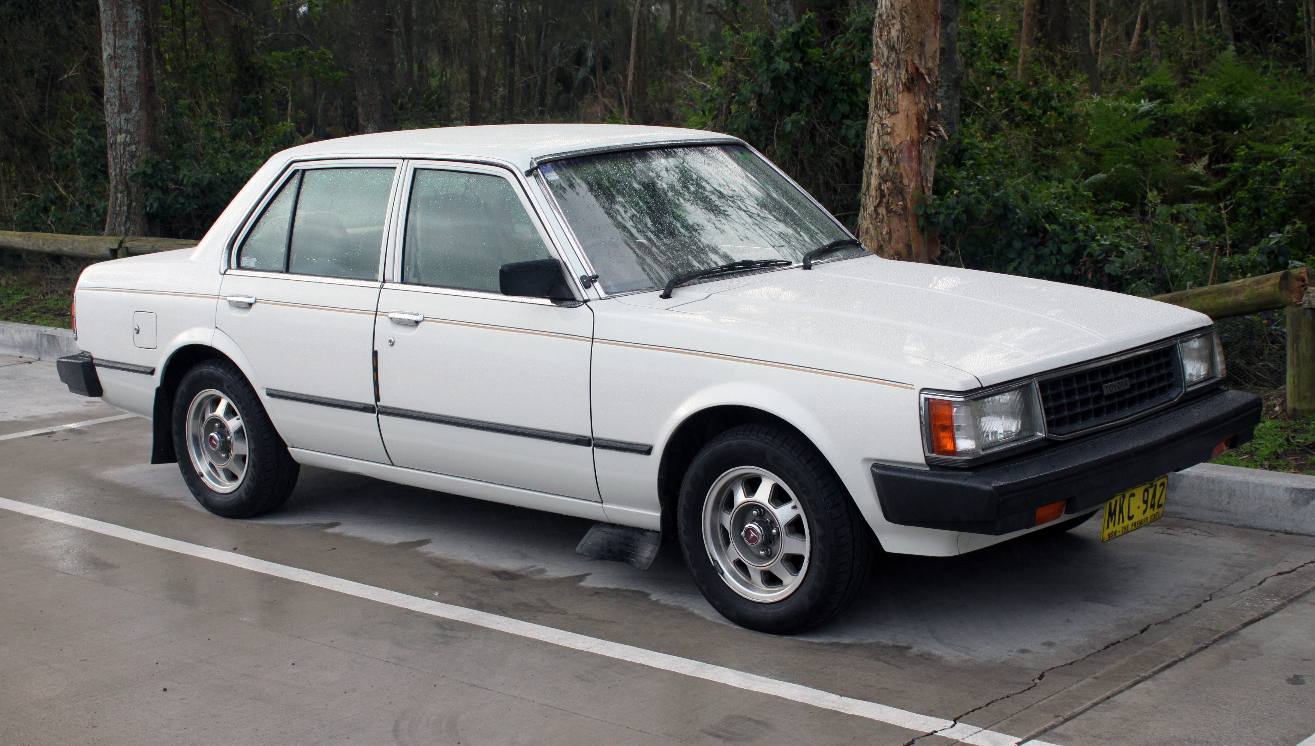 Toyota Corona RT133 XX